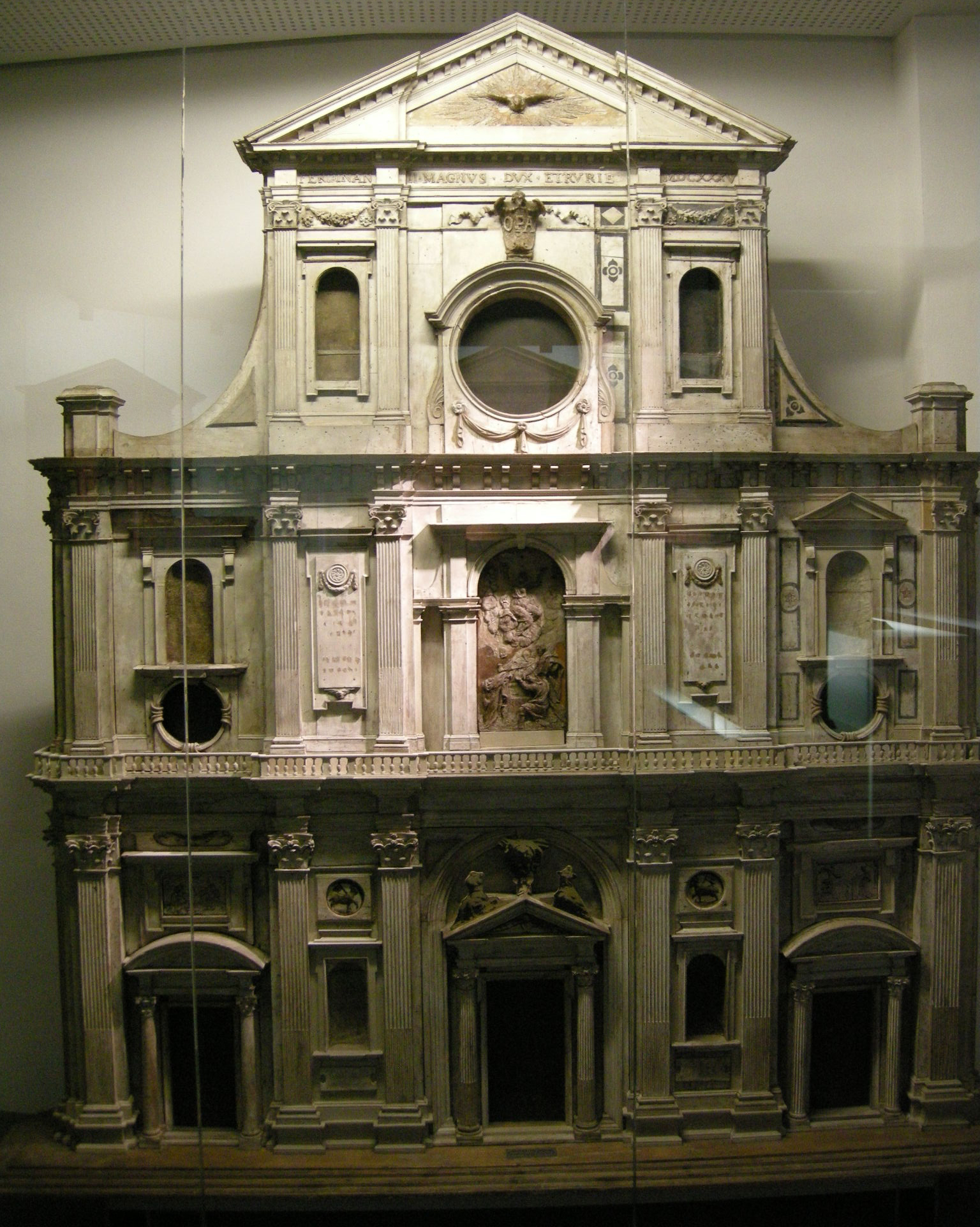 Progetto di facciata dell'accademia del disegno